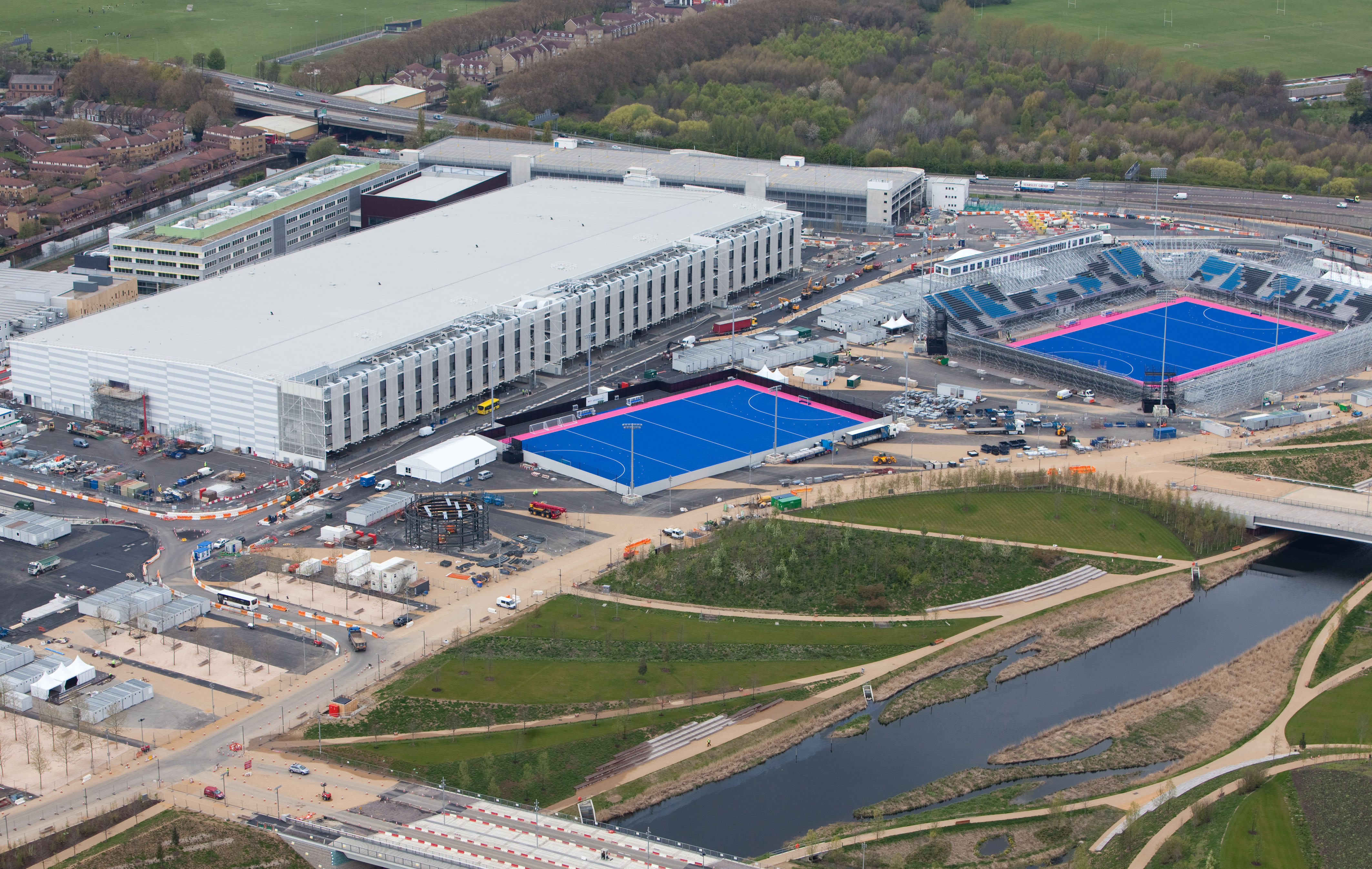 16 de abril 2012 - Centro Internacional de Transmisión